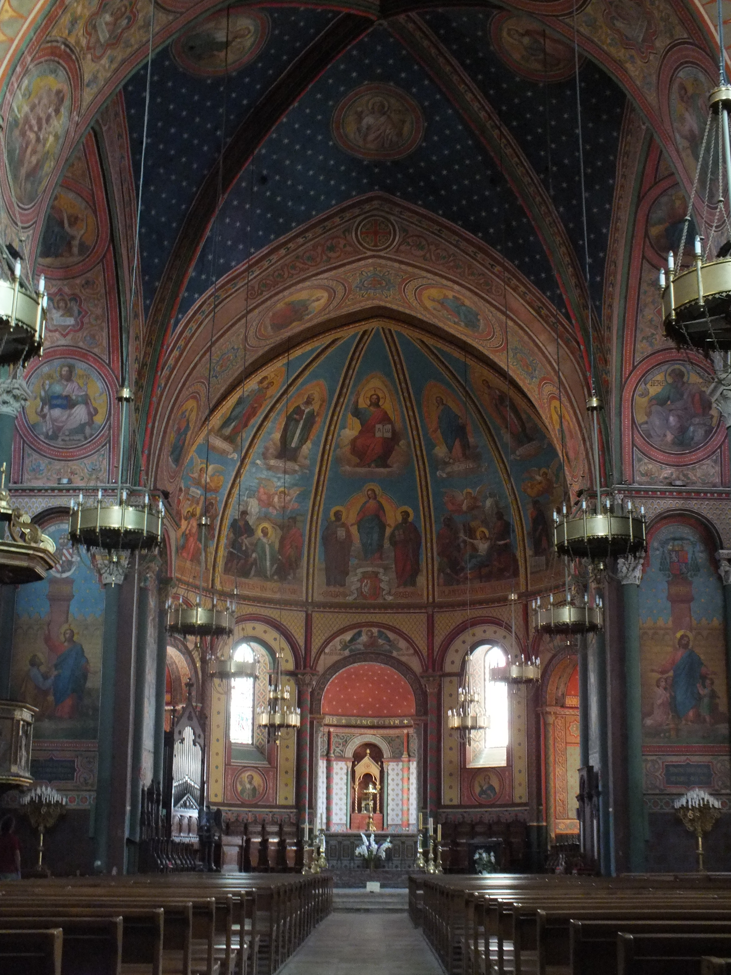 Cathédrale Saint-Caprais d'Agen, nef .